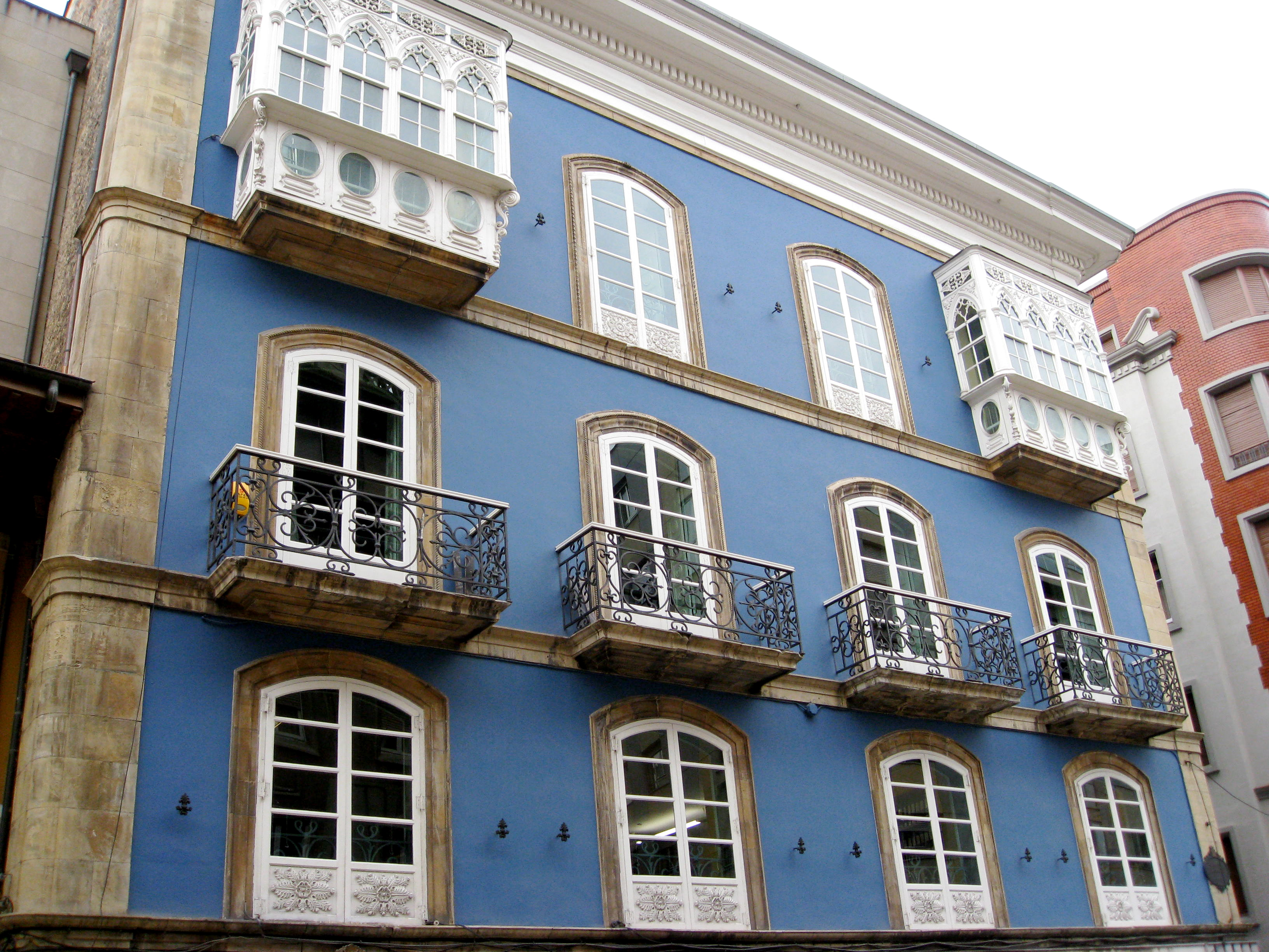 Palacio de Maqua, en Avilés, Asturias.